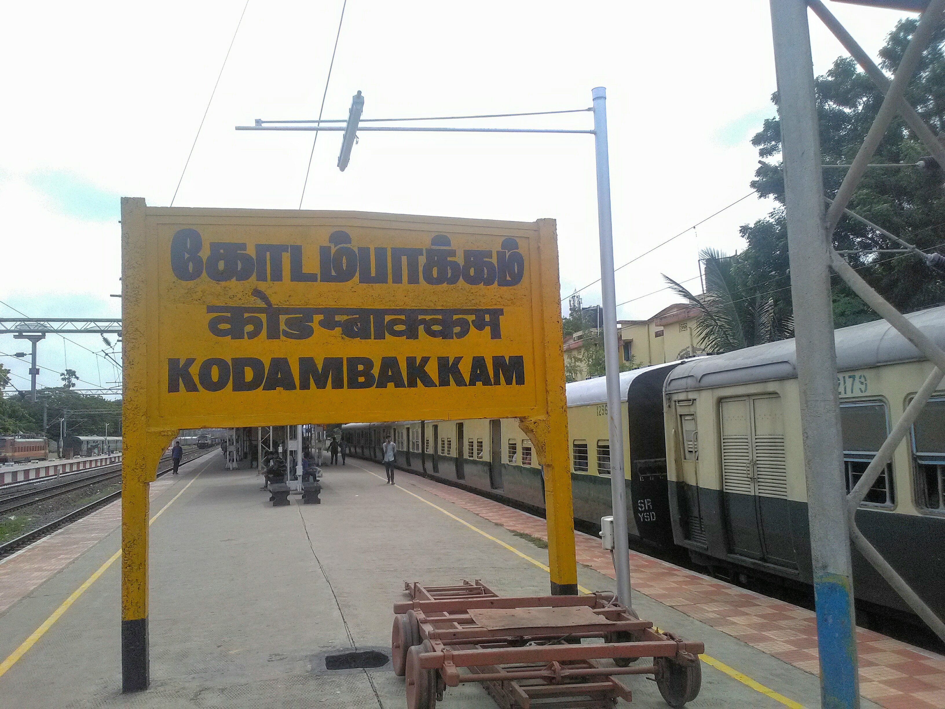 கோடம்பாக்கம் இரயில் நிலையத்தில் எடுக்கப்பட்ட புகைப்படம்.